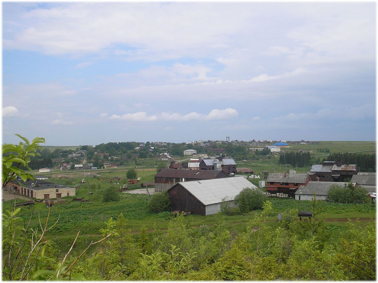 Деревня Дубовое вид с Малой горы